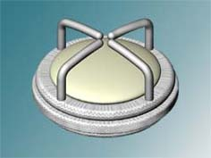 Модель искусственного клапана сердца МКЧ-29